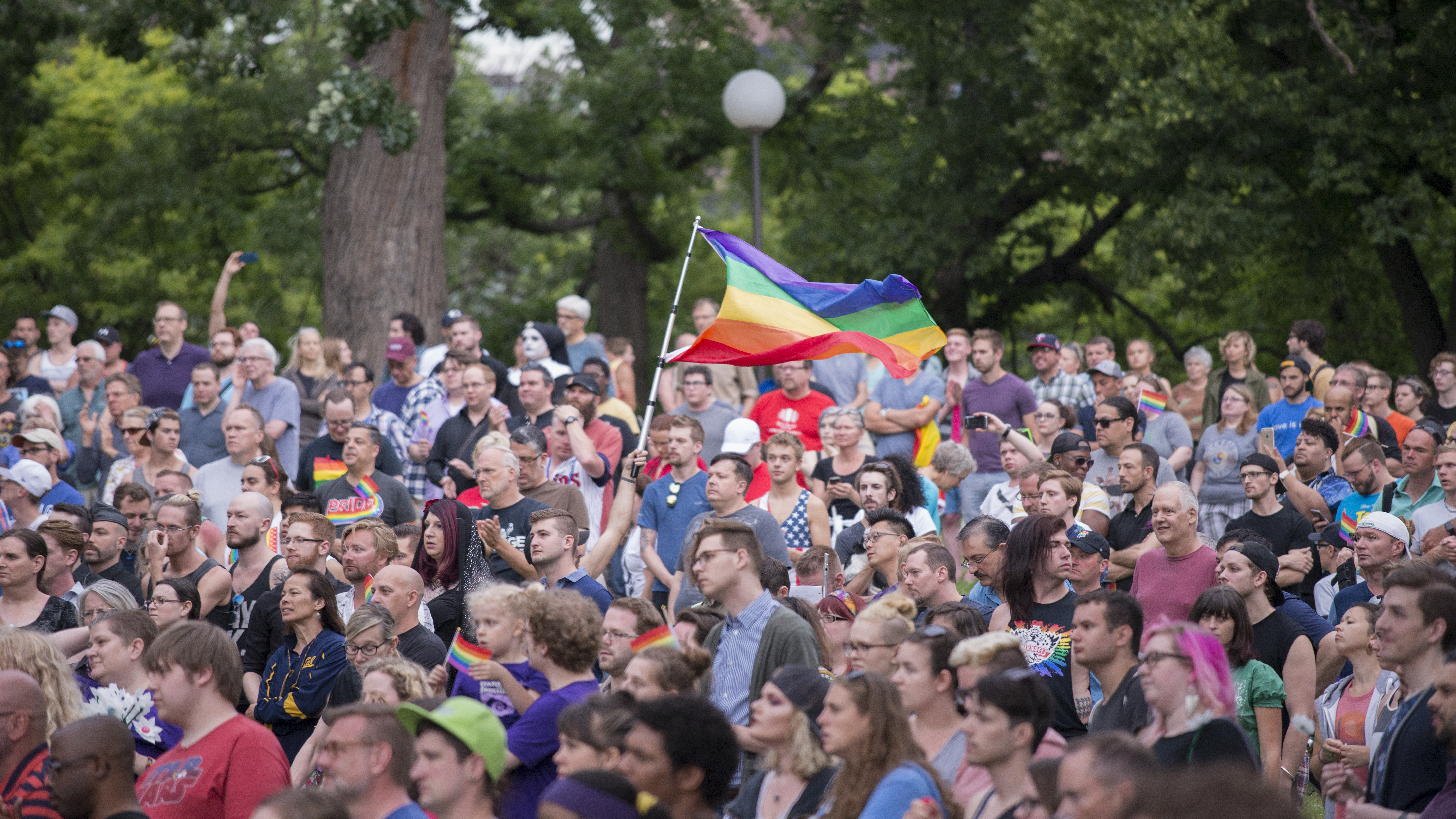 Minneapolis, Minnesota June 12, 2016